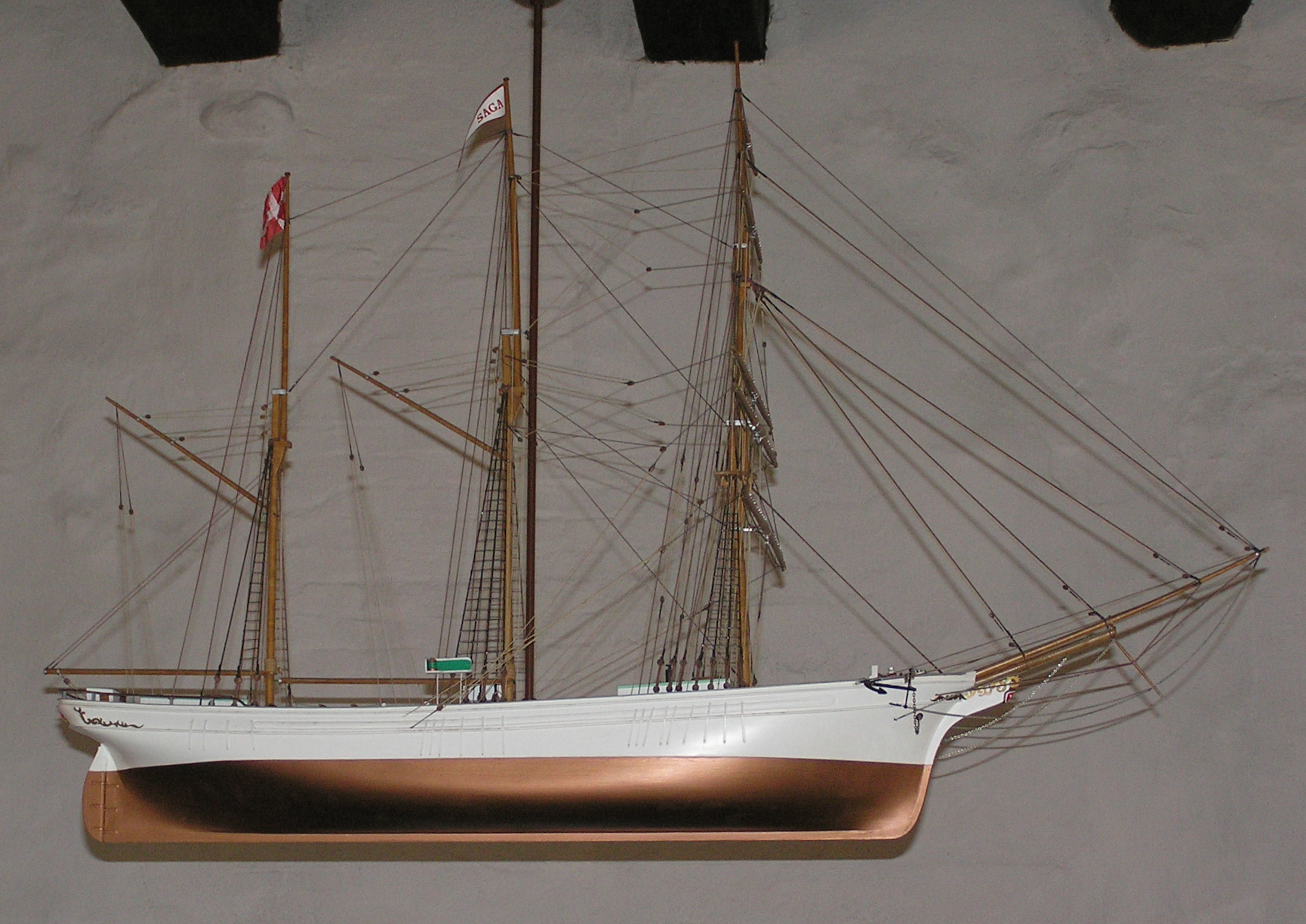 3 master skonnert, model efter barketinen Saga af Marstal, Skibsreder A.E. Sørensens første skib. Modellen er udført af maler Ove Andersen, Slagelse